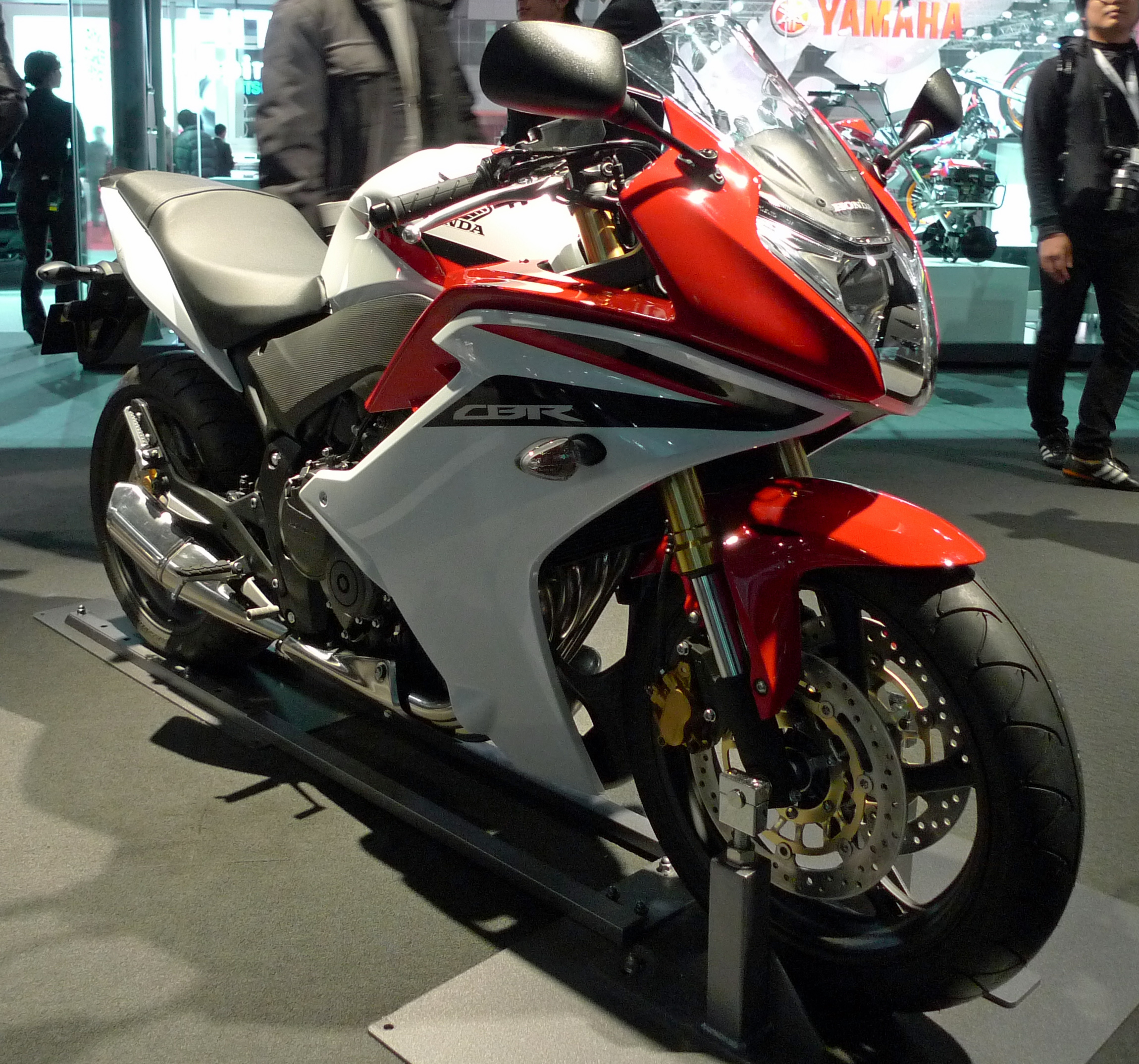 ホンダ・CBR600F 2012 東京モーターショーにて撮影